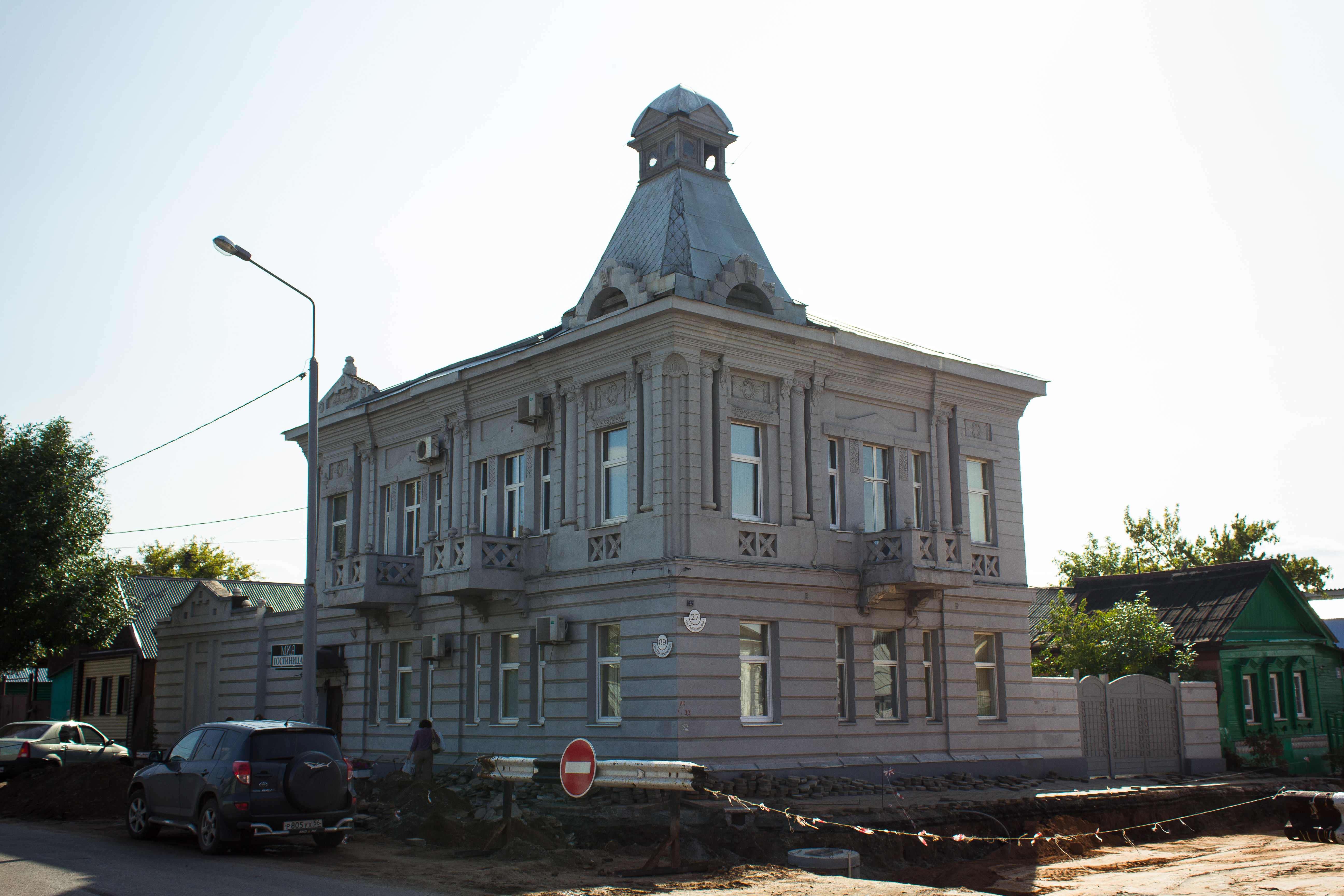 Особняк Хусаинова: улица Пролетарская, 89 / улица Рыбаковская, 27, Оренбург, Оренбургская область